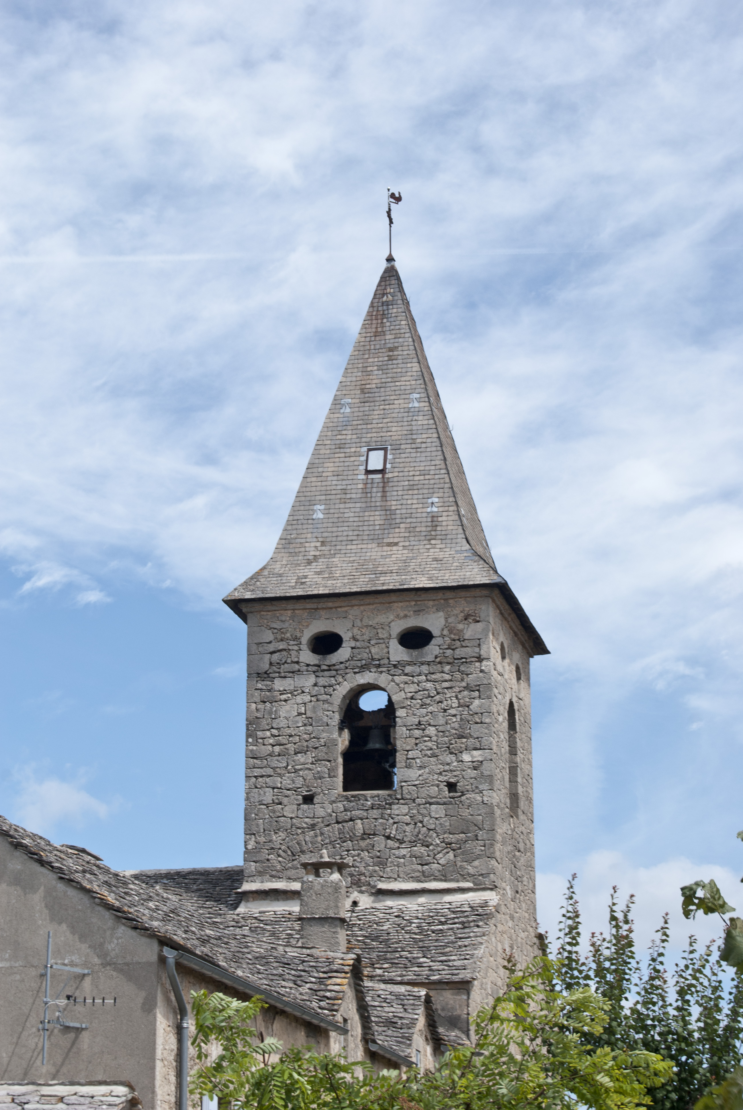 L'église de Saint-André-de-Vézines (Aveyron)